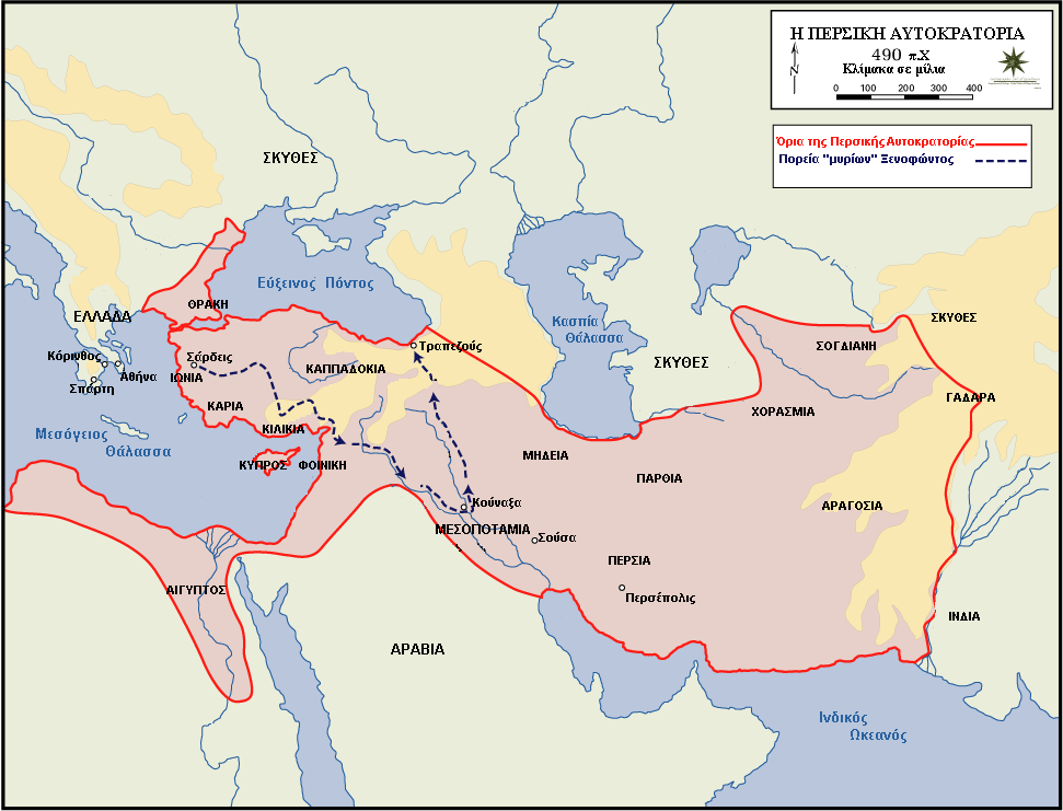 Η Περσική Αυτοκρατορία κατά το 490 π.Χ